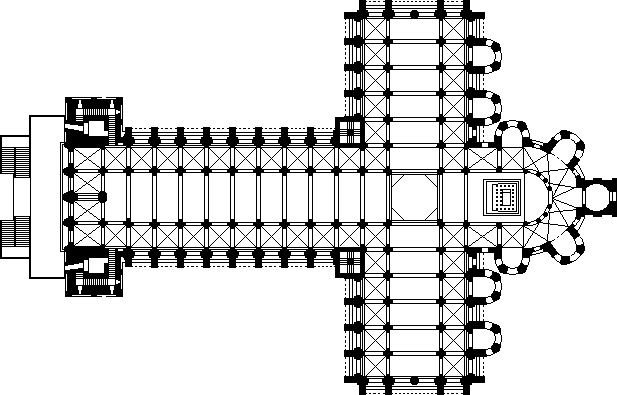 Planta de la Catedral de Santiago de Compostela (España) pertenece al modelo de la gran iglesia de peregrinación. Es una reconstrucción hipotética de la planta en el siglo XII, pues hoy día está muy modificada. Construida entre los años 1075 y 1188, entre otros, por el Maestro Bernardo el Viejo, el Maestro Esteban y el Maestro Mateo